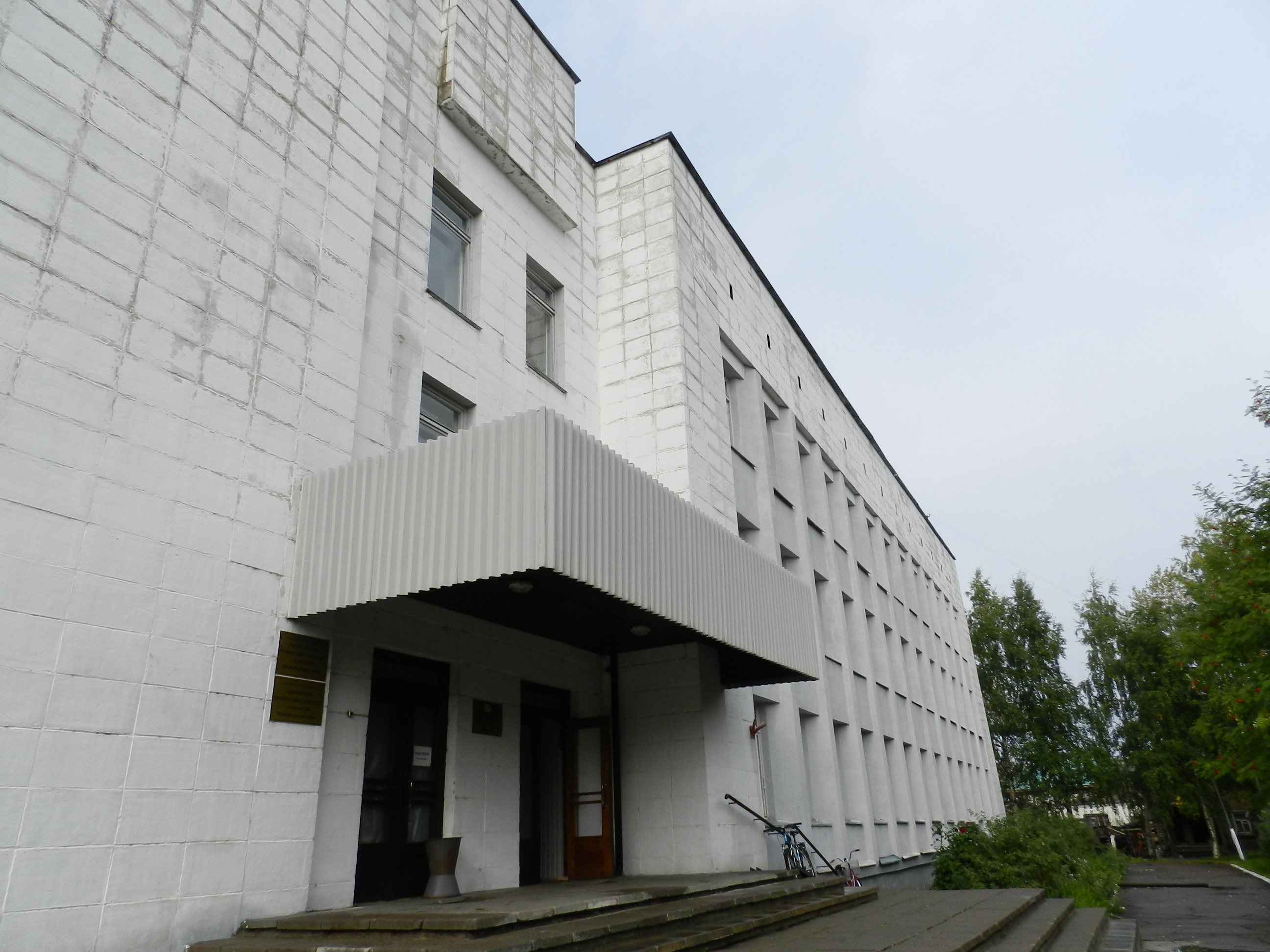 Администрация Хомогор